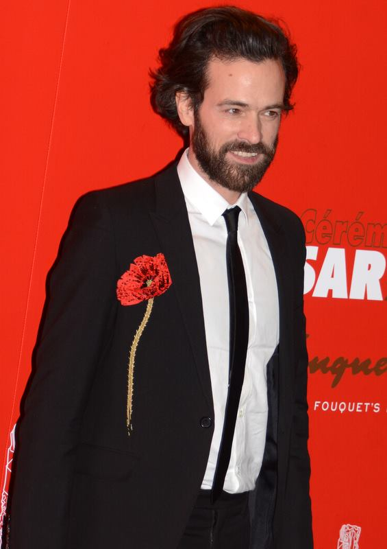 Romain Duris à la cérémonie des César